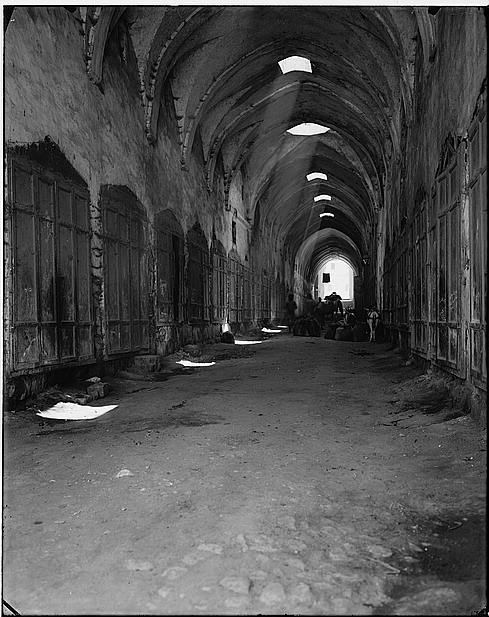 שוק הכתנים בשנות ה-20